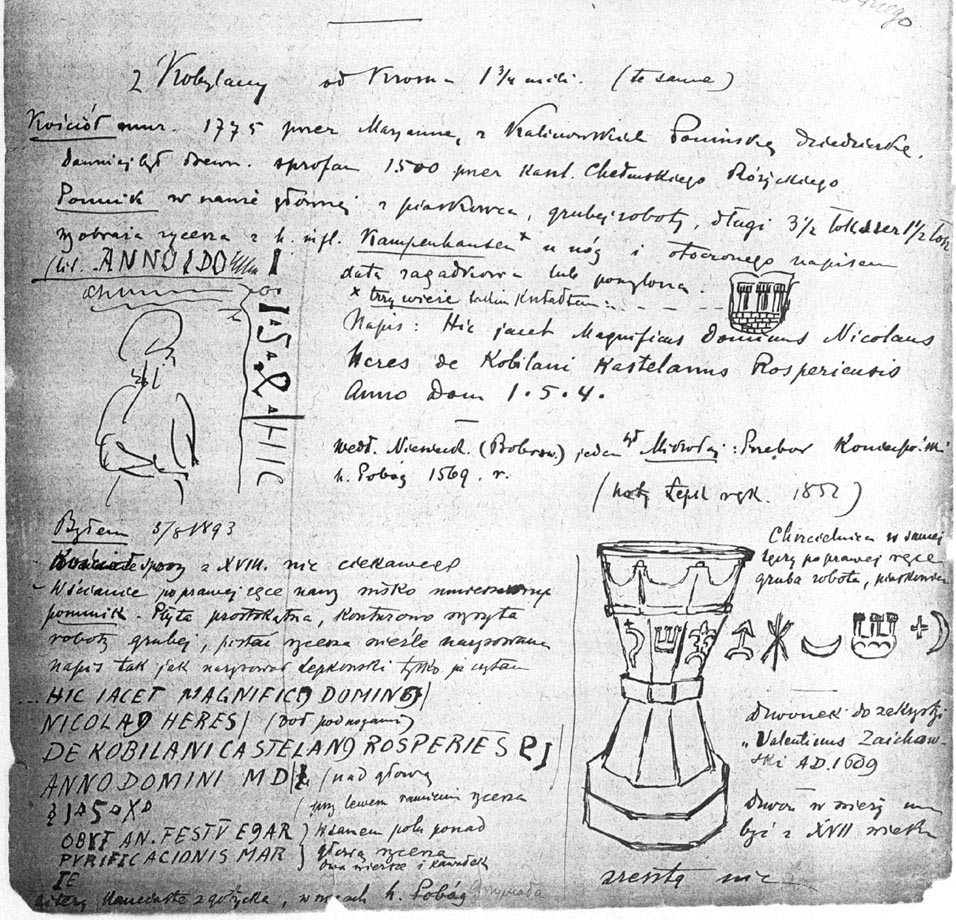 Stronica z hasłem Kobylany z rękopiśmiennego Inwentarza zabytków powiatu krośnieńskiego Stanisława Tomkowicza, własność Muzeum Narodowe w Krakowie, sy-gn.: rkps MNK 610, fot. Tadeusz Łopatkiewicz author: Stanisław Tomkowicz source: Muzeum Narodowe w Krakowie, sy-gn.: rkps MNK 610, fot. Tadeusz Łopatkiewicz